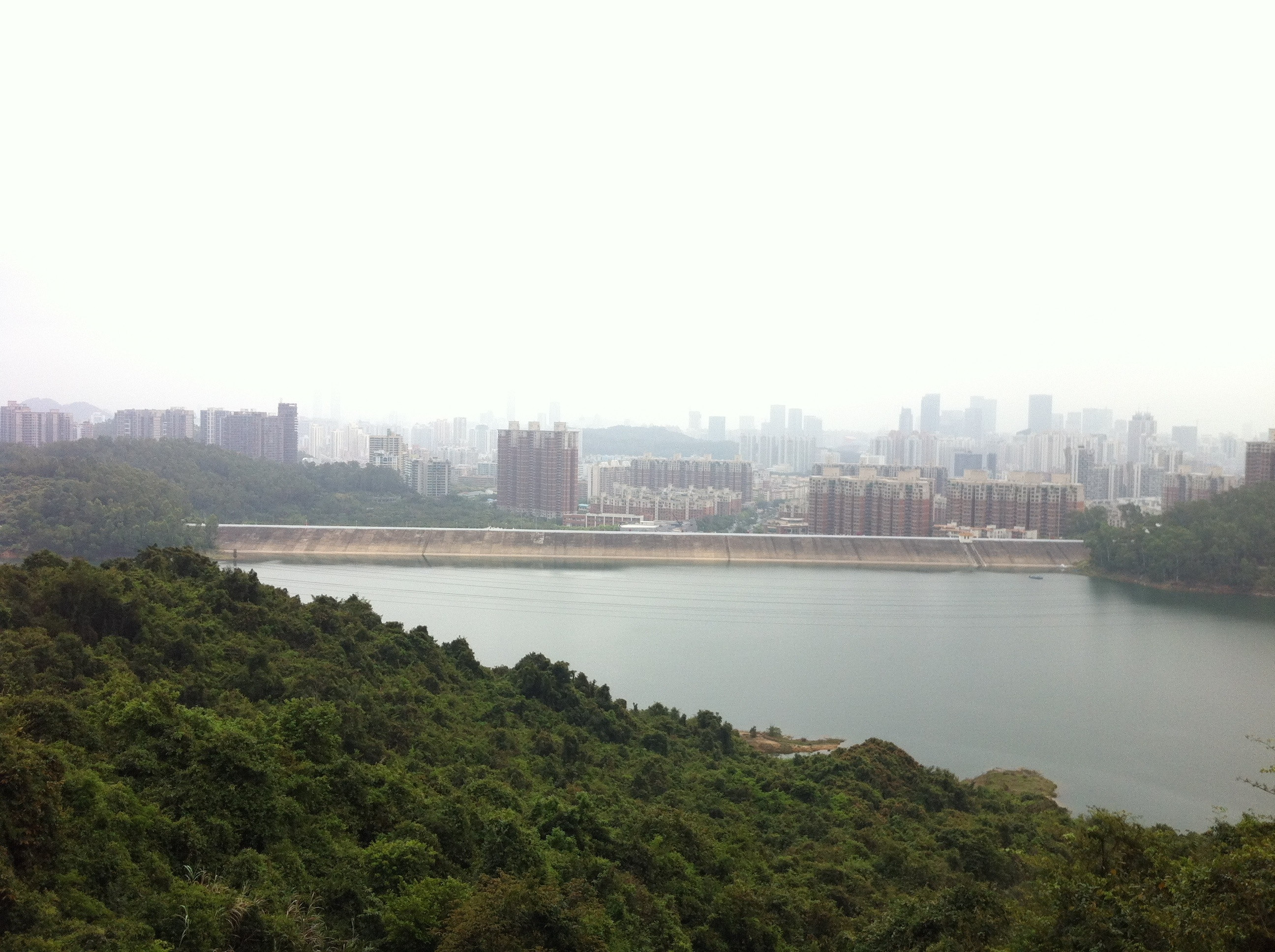 2012 深圳 梅林水库